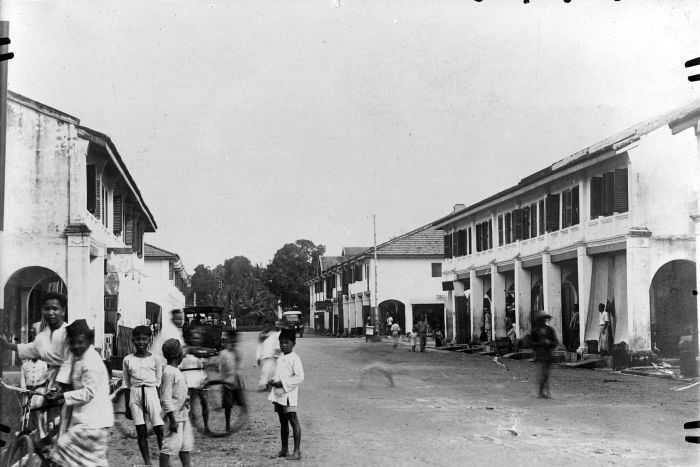 Repronegatief. Hoofdstraat te Koealasimpan, Oostkust van Atjeh